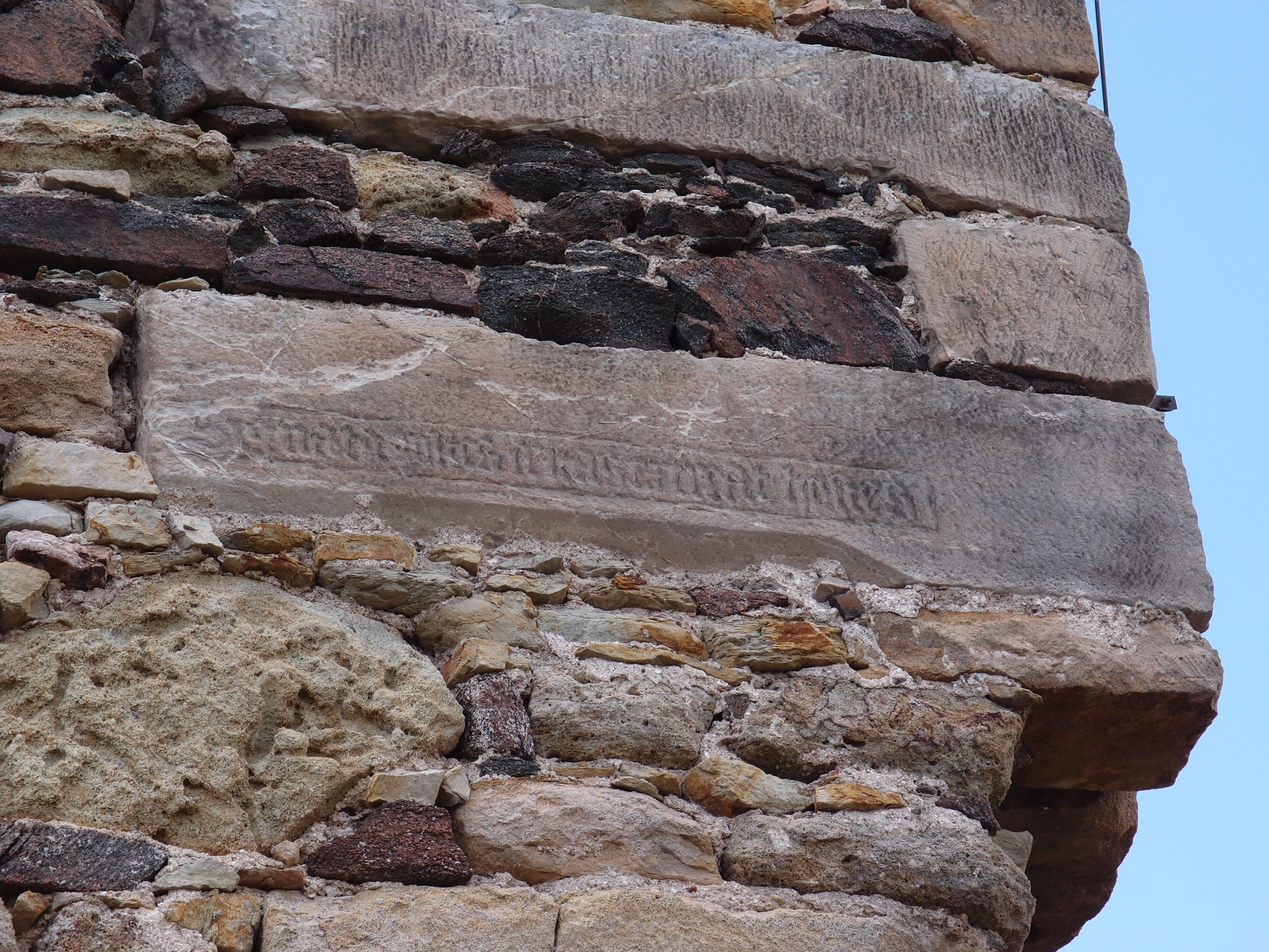 Středověký nápis na Potštejně